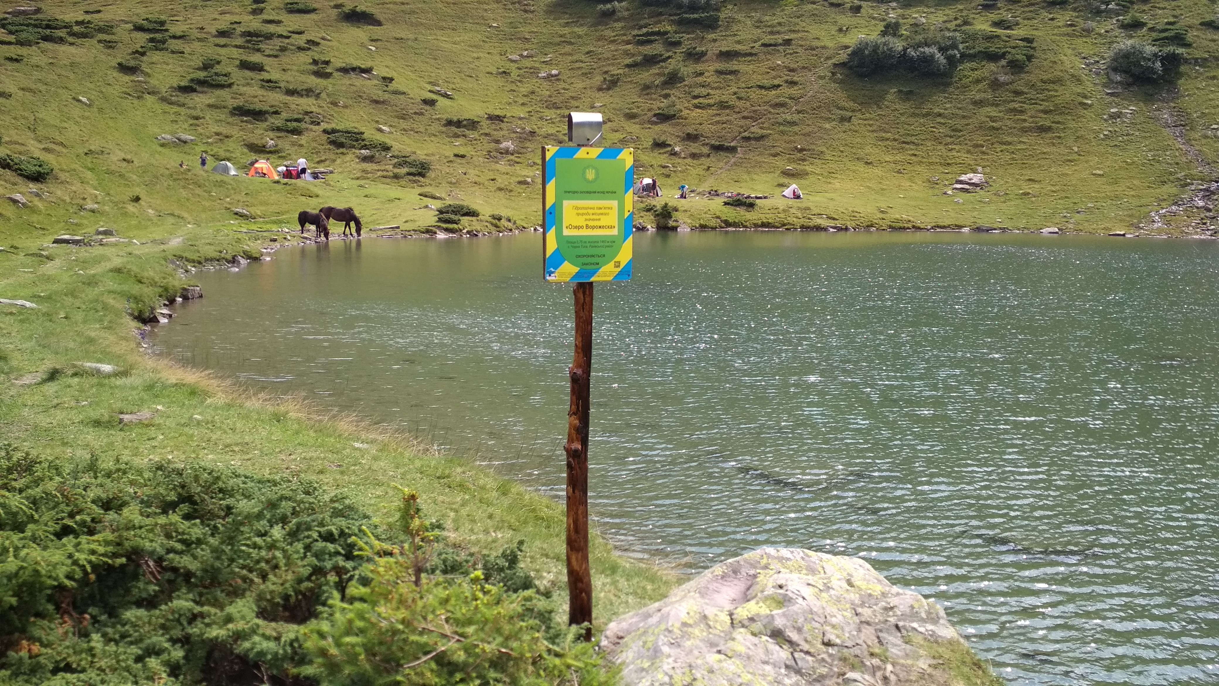 знак ПЗФ